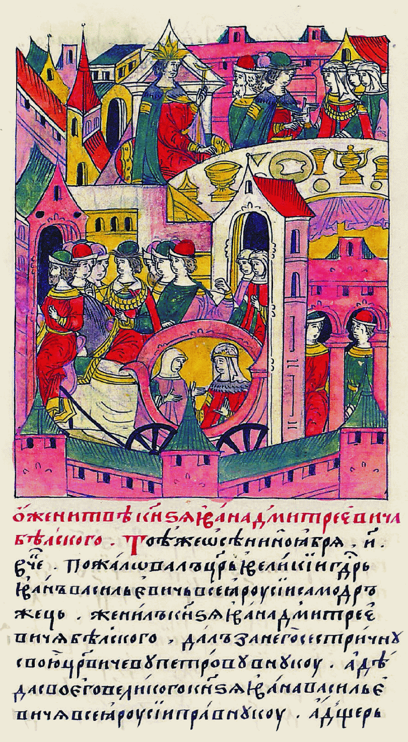 О женитьбе князя Ивана Дмитриевича Бельского. Той же осенью 8-го ноября в четверг пожаловал царь и великий государь Иван Васильевич, всея Руси самодержец, женил князя Ивана Дмитриевича Бельского, дал за него сестоичну свою, царевича Петра Внучку, а деда своего великого князя Ивана Васильевича всея Руси правнучку, а дочь князя Василия Васильевича Шуйского; а выдавал государь от себя со своего двора. Миниатюра Лицевого летописного свода XVI в.